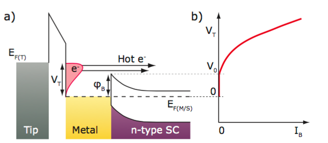 Esquema BEEM